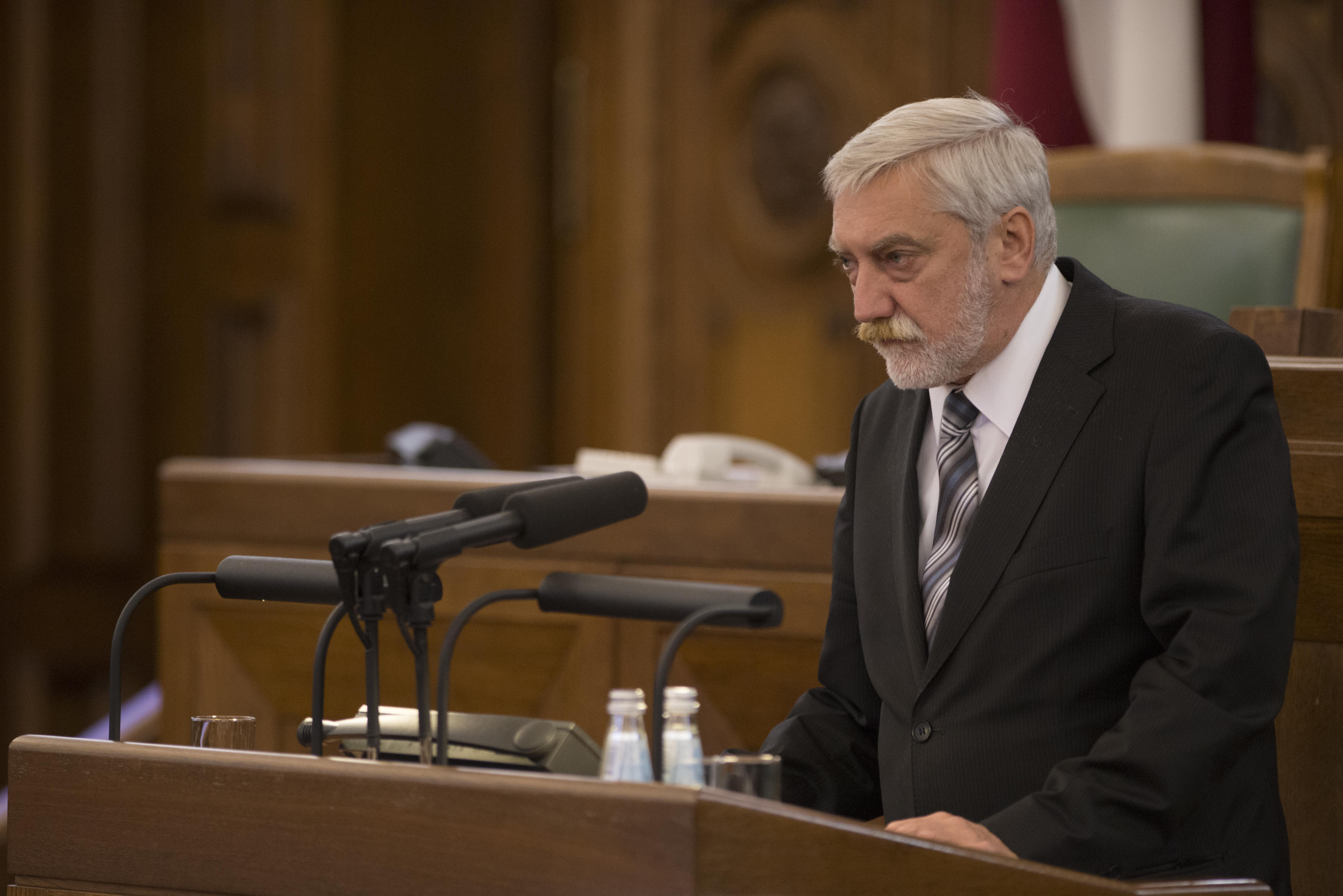 2014.gada 4.novembris. Deputāts Sergejs Mirskis dod svinīgo solījumu. Foto: Juris Vīgulis, Saeimas Kanceleja Izmantošanas noteikumi: saeima.lv/lv/autortiesibas